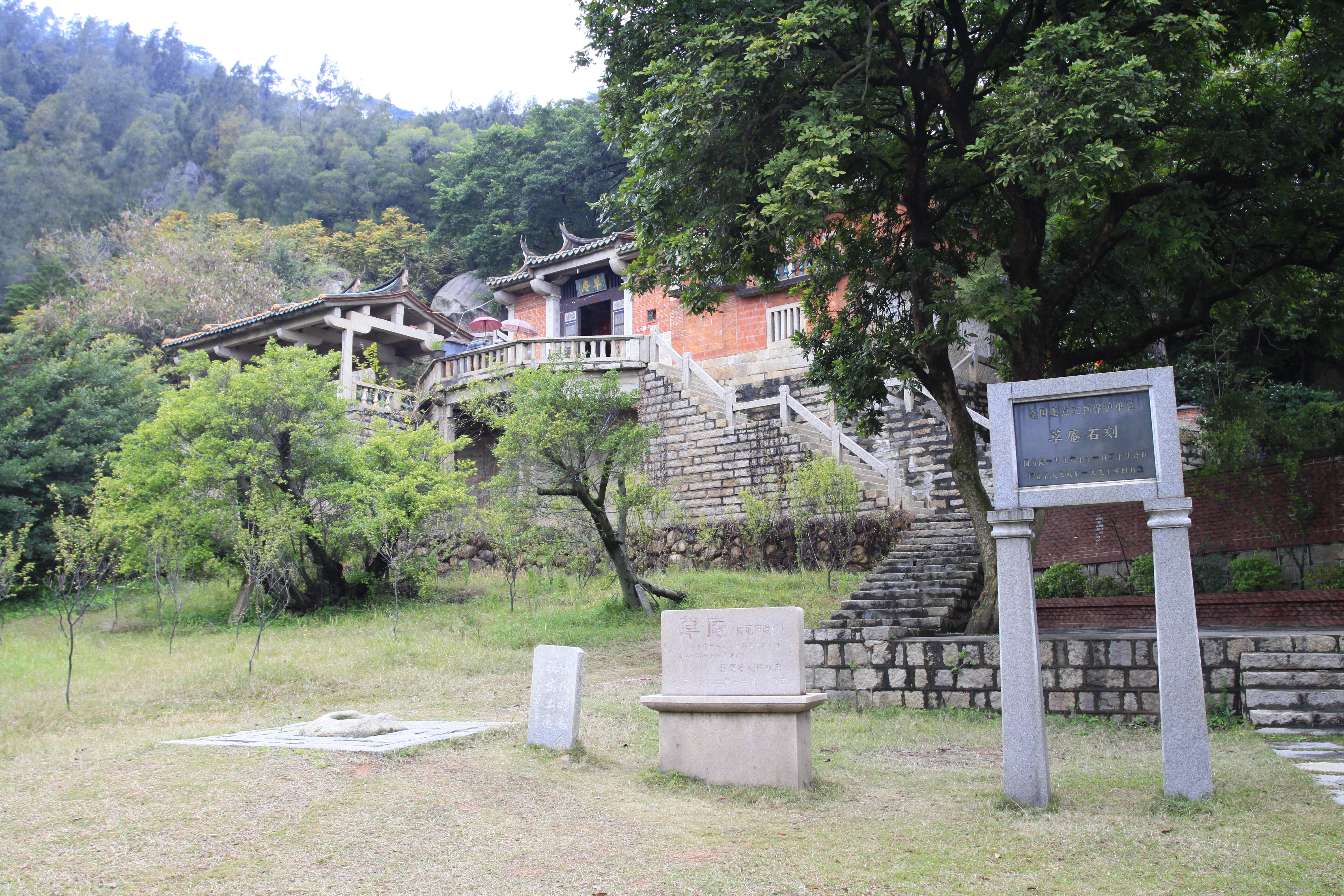 草庵，位于中国福建省晋江市，是全国重点文物保护单位。